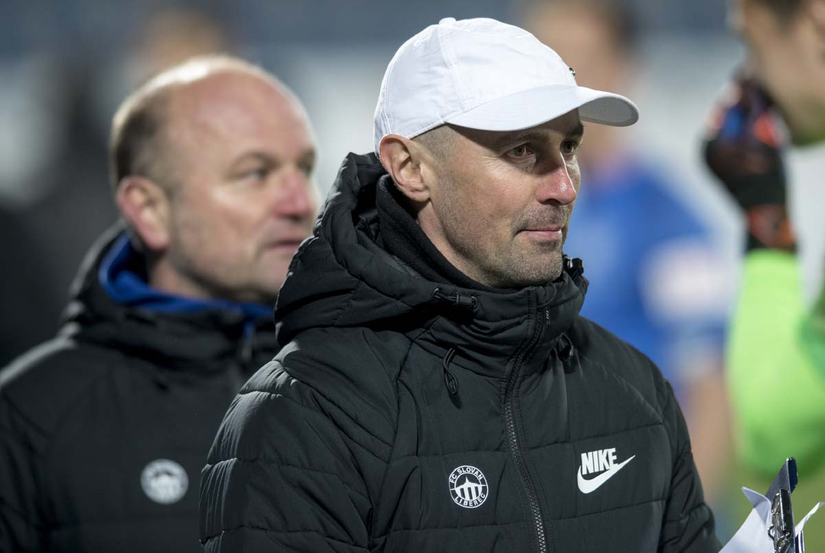 Miroslav Holeňák na laviččce Slovanu Liberec